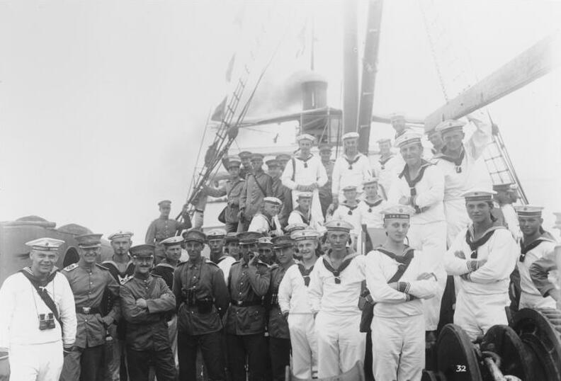 China, Tsingtau China, Tsingtau um 1912 [China, Tsingtau.- Gruppenbild von Matrosen auf einem Schiff [Fotoalbum: Bilder aus China, von Ob.Matr.Artl. Quinten; Bem.: Originaltitel z.T. inkorrekt